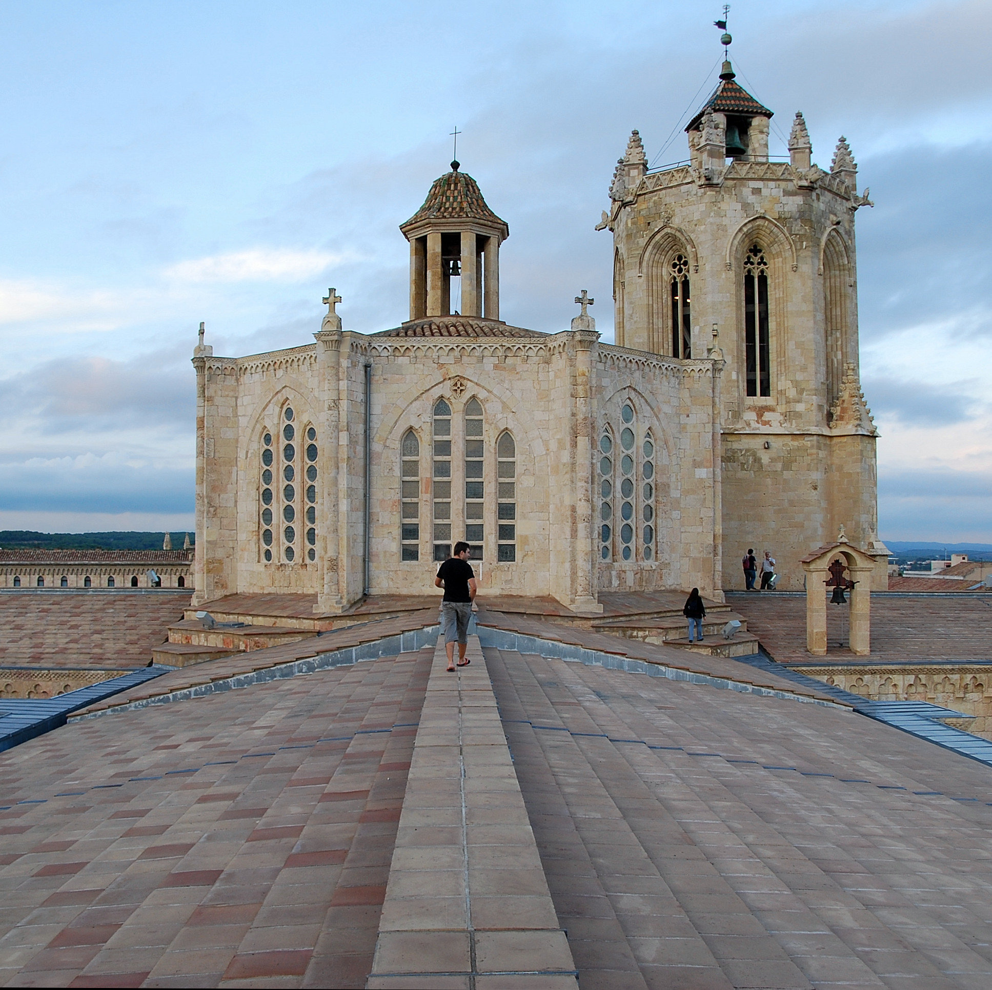 Catedral de Santa Maria (Tarragona)